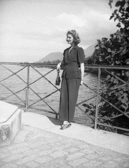 Françoise Aubut-Pratte, photographie prise lors d’un de ses voyages en Europe.